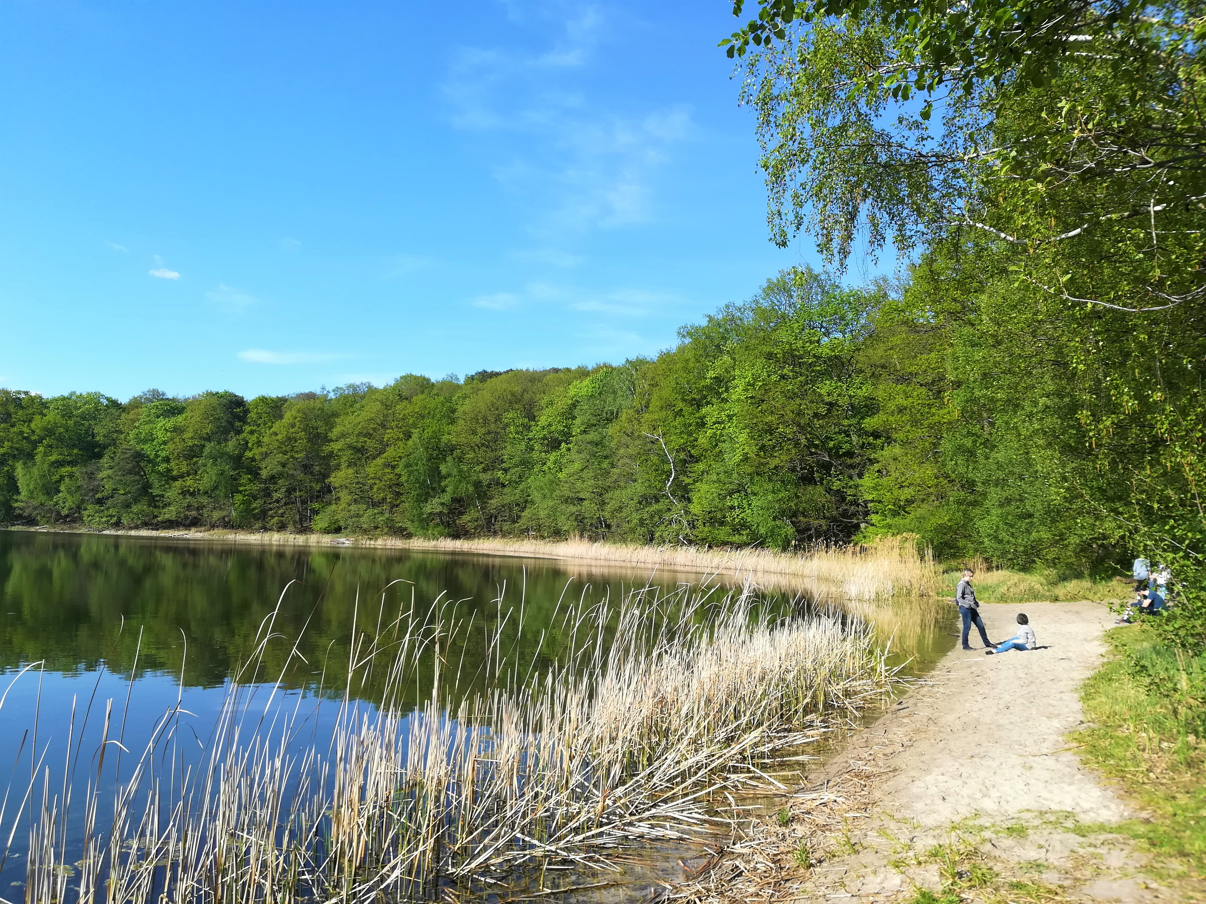 Jezioro Góreckie wiosną 2020 roku.